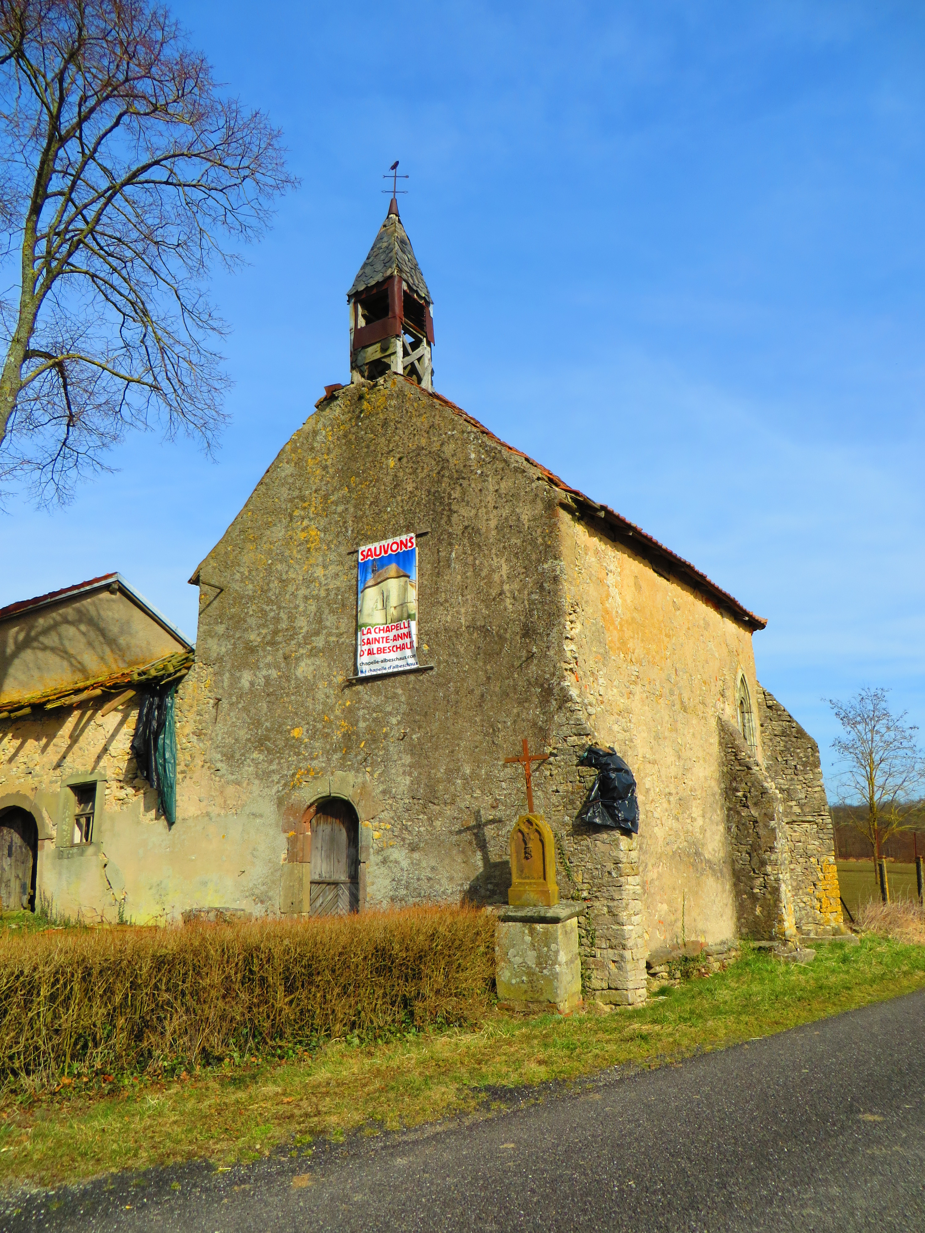 Albeschaux chapelle ste anne